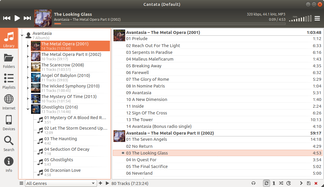 Řada skladeb k přehrání: seskupeno Angličtina (English): Playqueue: grouped